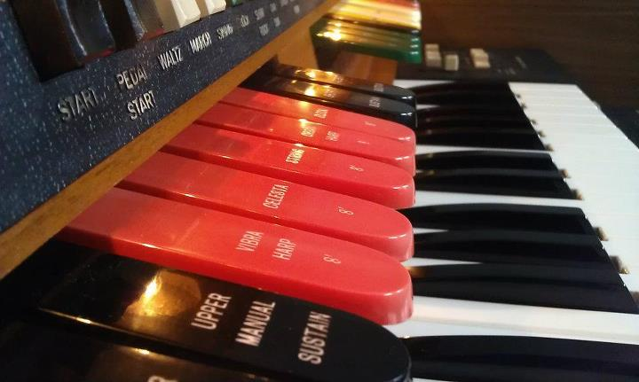 Detaljbild på orgeln Eminent 310 Unique Theatre.